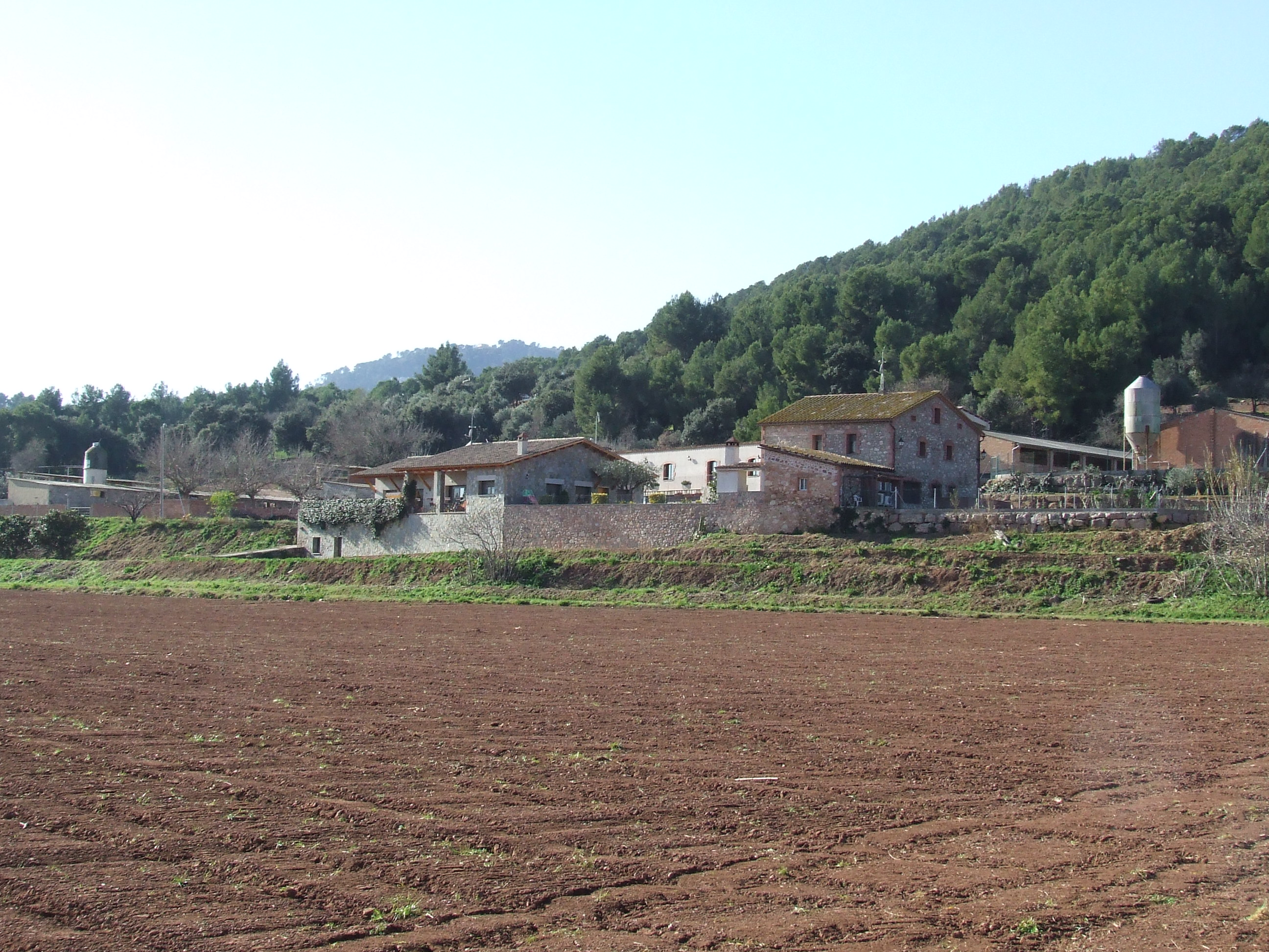 Can Feliu (Bigues, Bigues i Riells, Vallès Oriental)